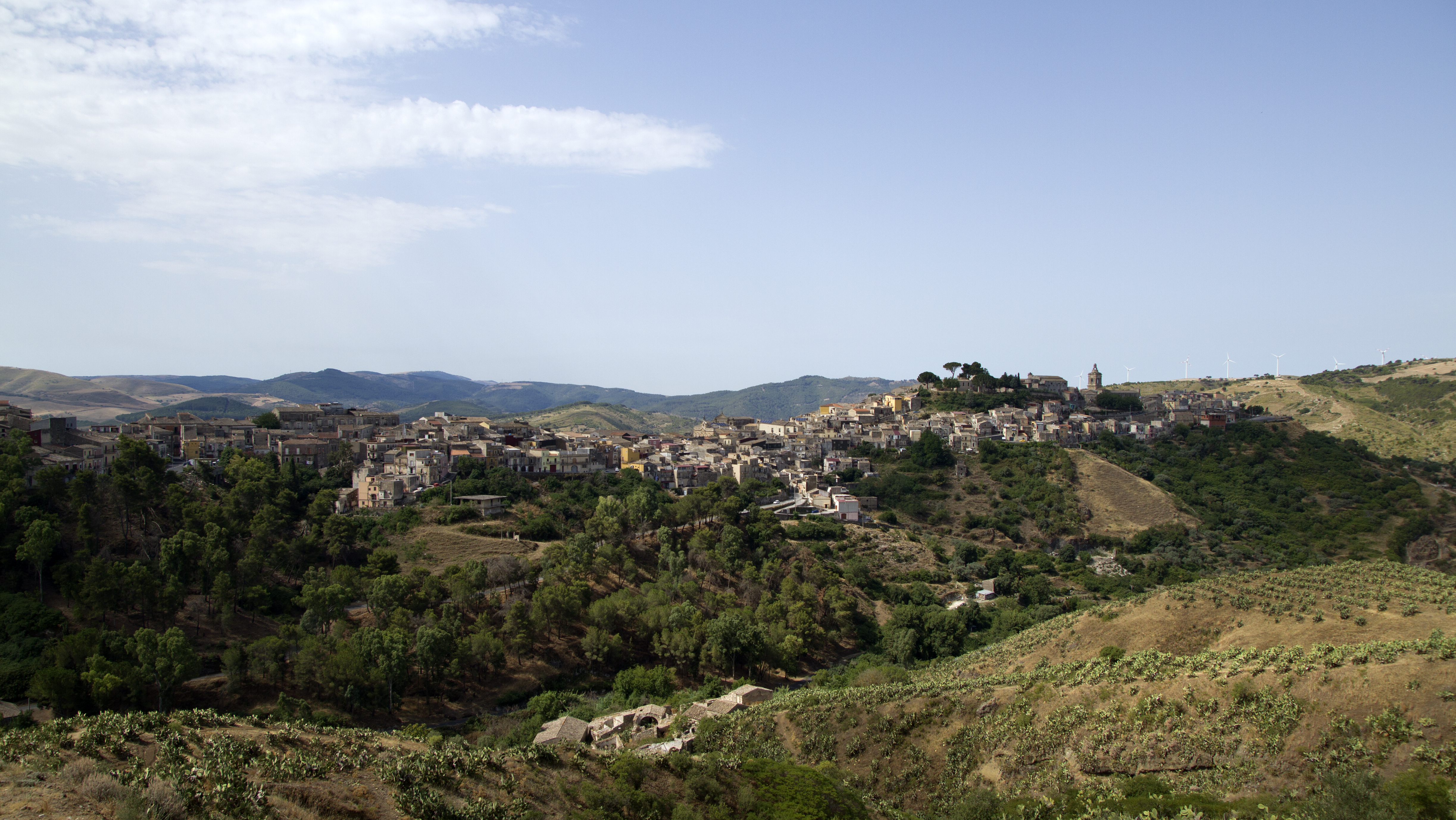 Vizzini, Catania, Sicily, Italy